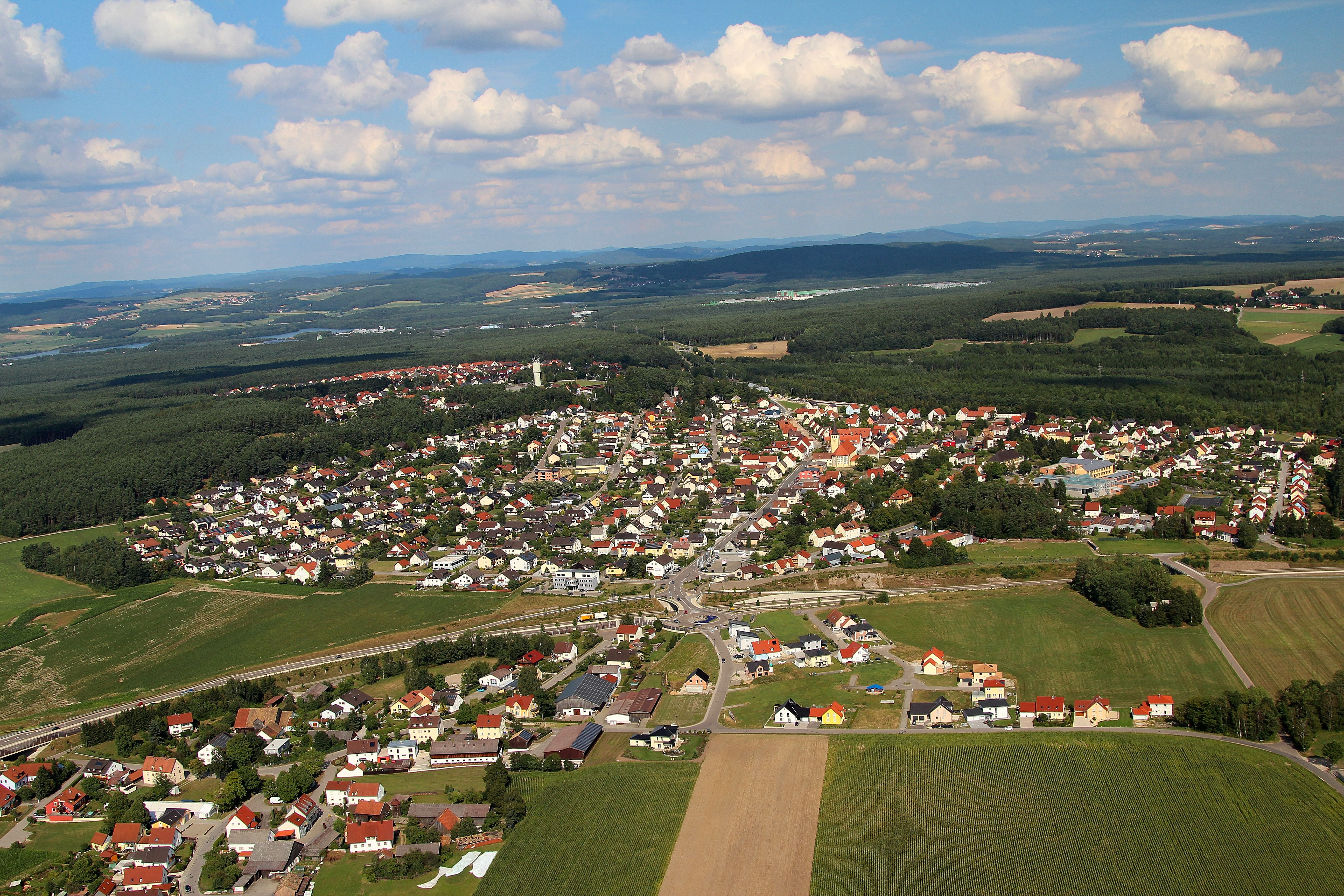 Wackersdorf, Landkreis Schwandorf, Oberpfalz, Bayern